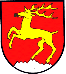 Wappen der Gemeinde Deutschfeistritz in Österreich